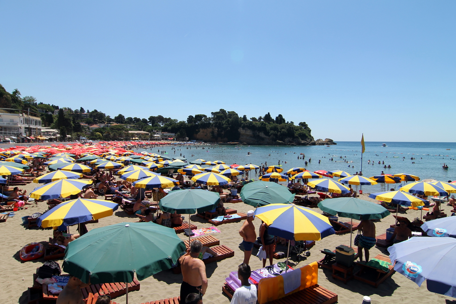 IMG_4970Montenegro_Ulcinj